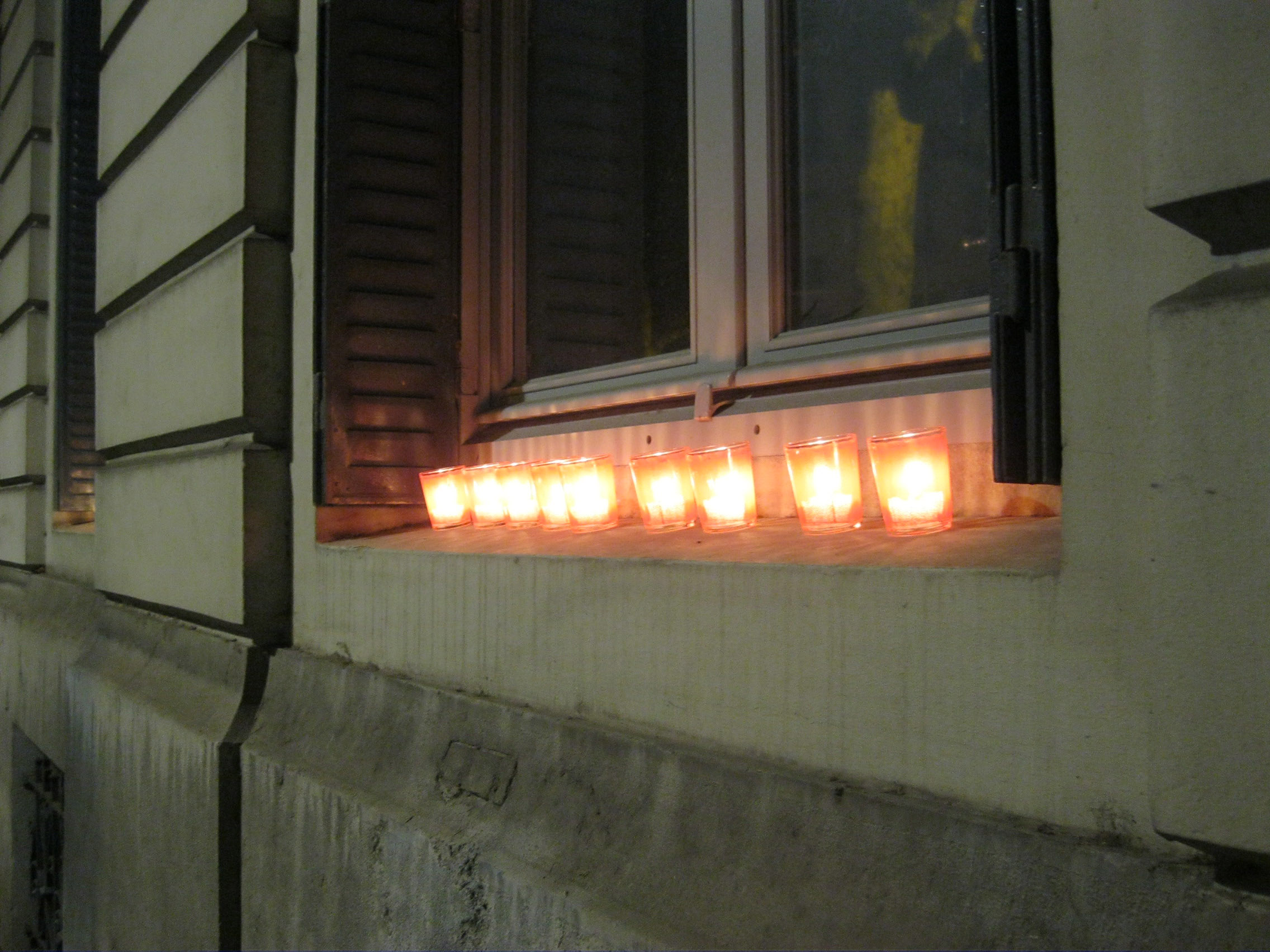 Lumignons sur le rebord d'une fenêtre à Lyon pendant la fête des lumières 2013.